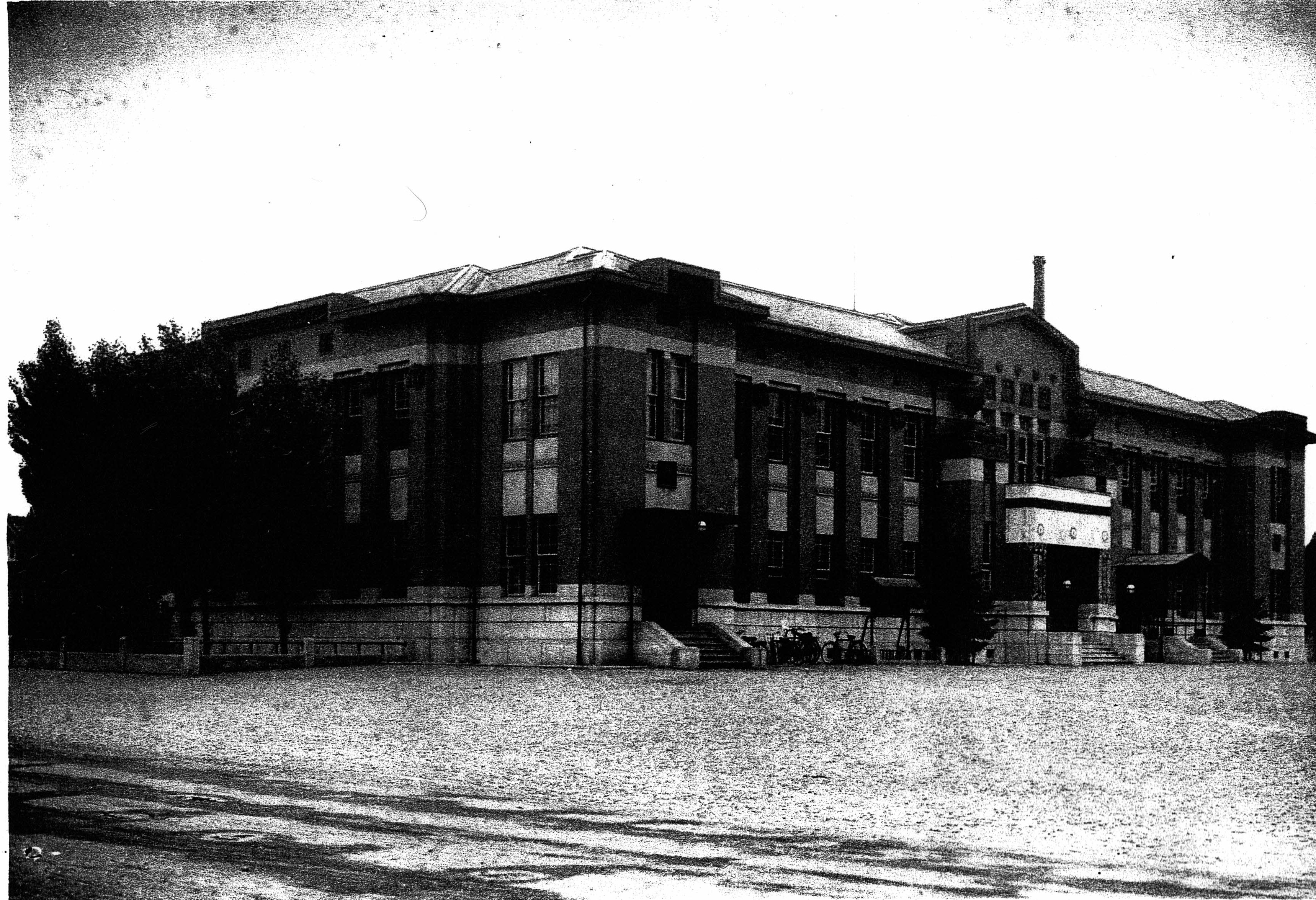 名古屋市立名古屋図書館（鶴舞中央図書館の前身）の外観写真。撮影日時、撮影者などの詳細は不明。